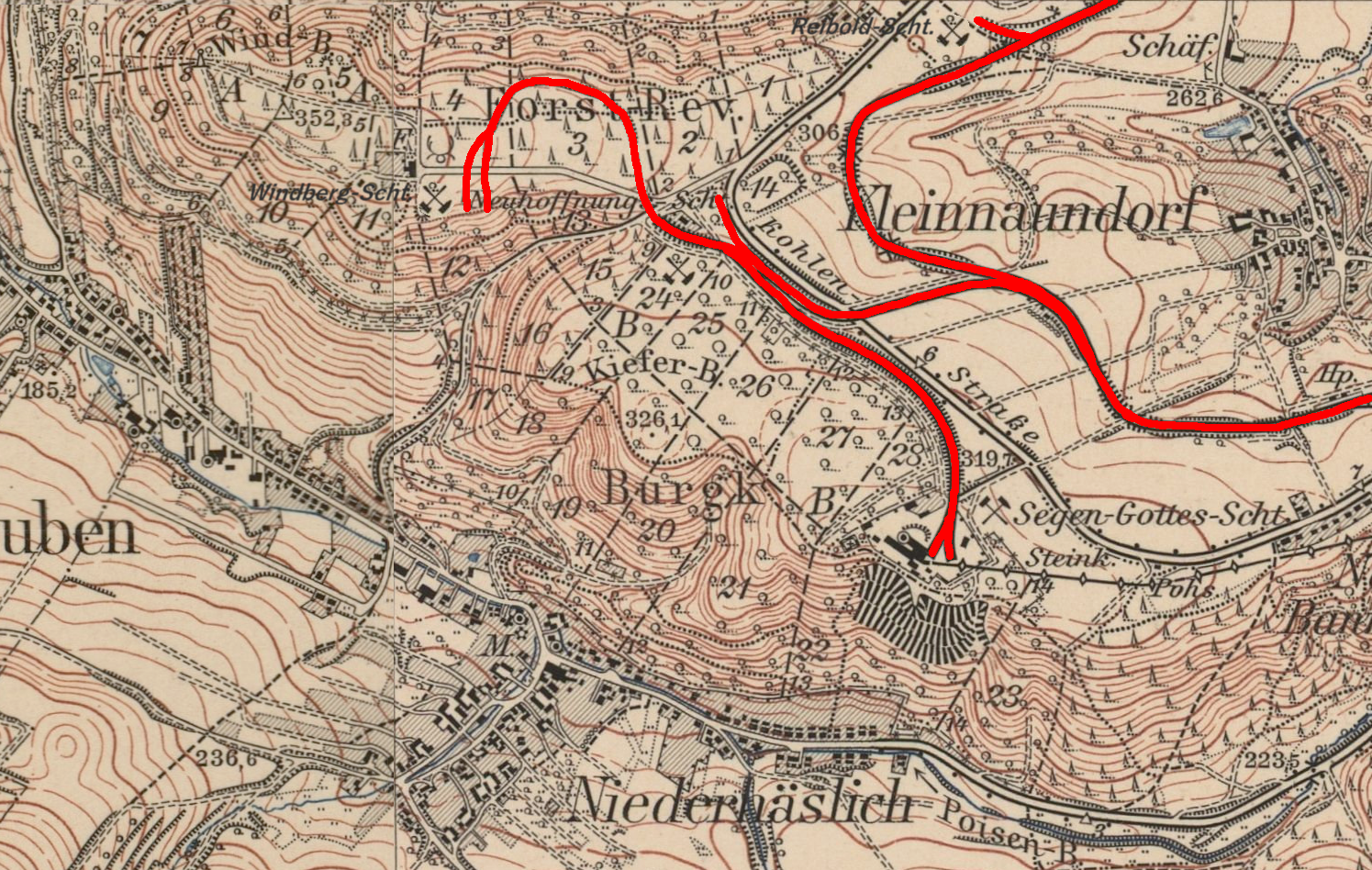 Topographische Karte (Messtischblätter) Sachsen, Ausschnitt Kreischa Blatt 82, Wilsdruff Blatt 65,1:25000,1913, 1912, Kohlebahn am Windberg.